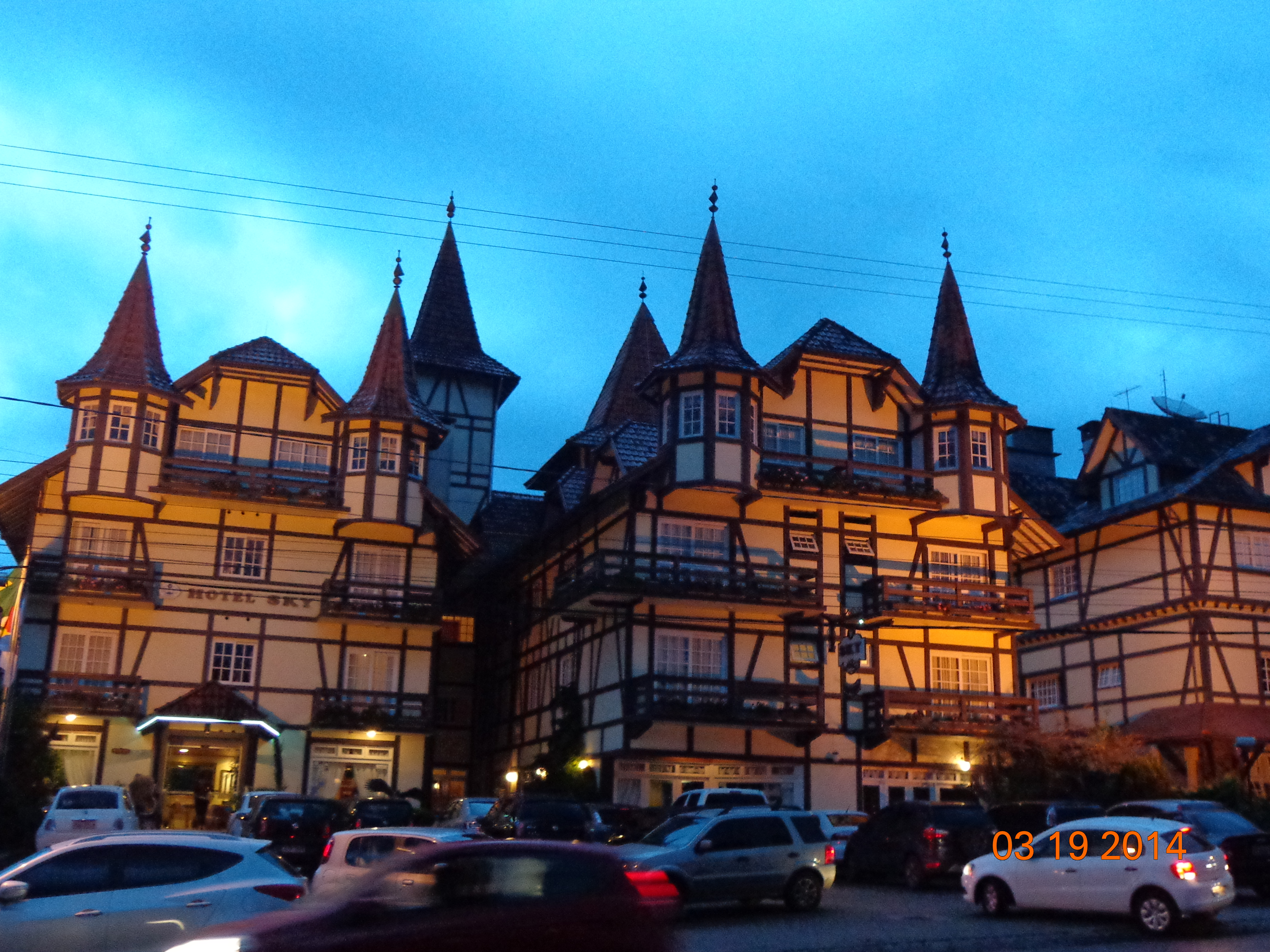 Planalto, Gramado - RS, Brazil